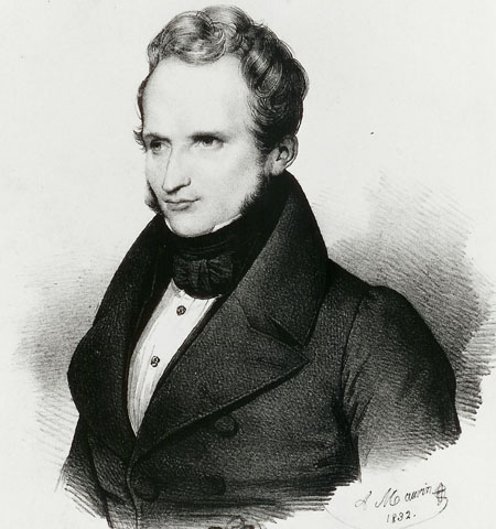 Portrait lithographié d’Alfred de Vigny.